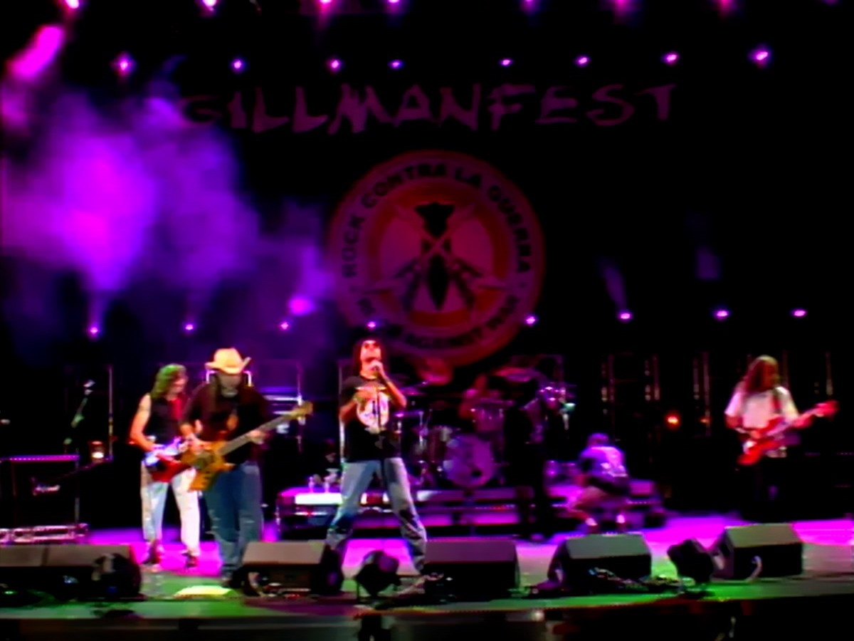 arkangel